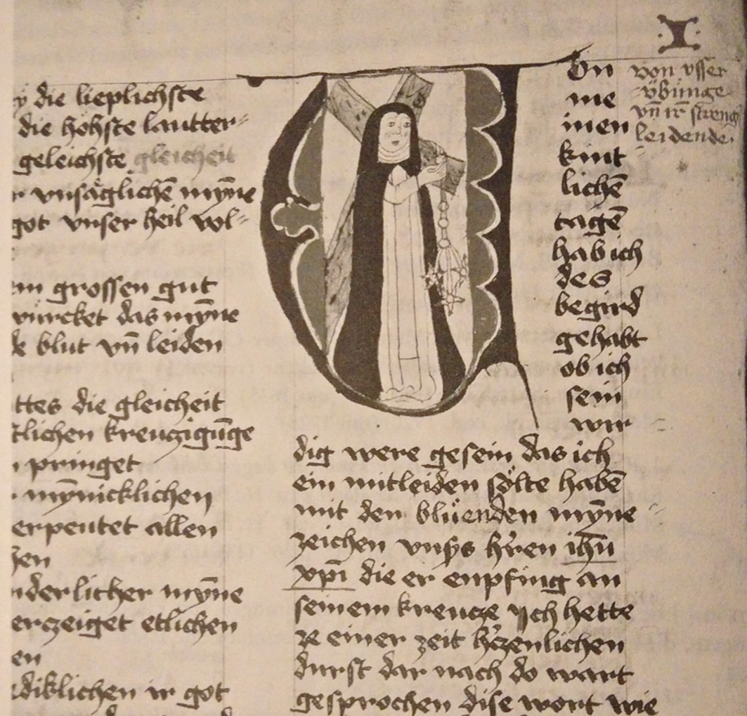 Quelle: Wolfram Schneider-Lastin: Leben und Offenbarung der Elsbeth von Oye. Textkritische Edition der Vita aus dem ›Ötenbacher Schwesternbuch‹. In: Kulturtopographie des deutschsprachigen Südwesten im Spätmittelalter. Studien und Texte. Hrsg. von Barbara Fleith und René Wetzel. Berlin/ New York: de Gruyter 2009. (= Kulturtopographie des alemannischen Raums. 1.) S. 404.